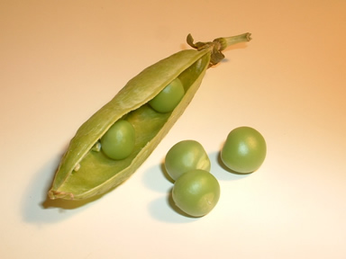 selbst fotografiert